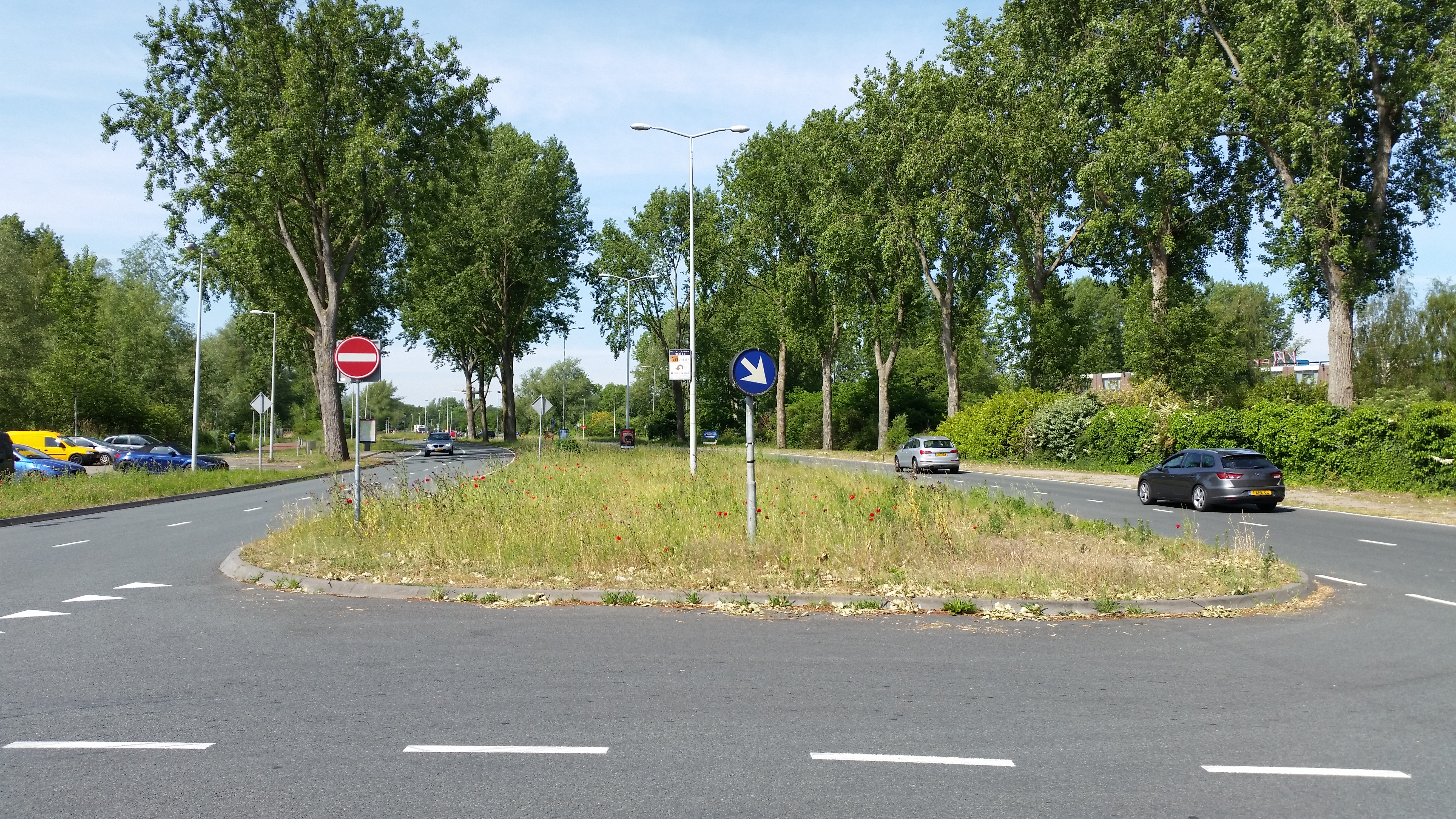 Oude Haagseweg in Amsterdam, gezien naar Oude Haagsebrug (mei 2020)